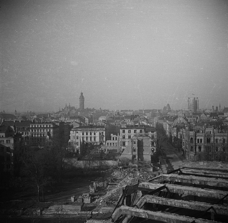 Original image description from the Deutsche Fotothek Leipzig Zentrum, Blick auf das Neue Rathaus, Panorama Teil 1 links